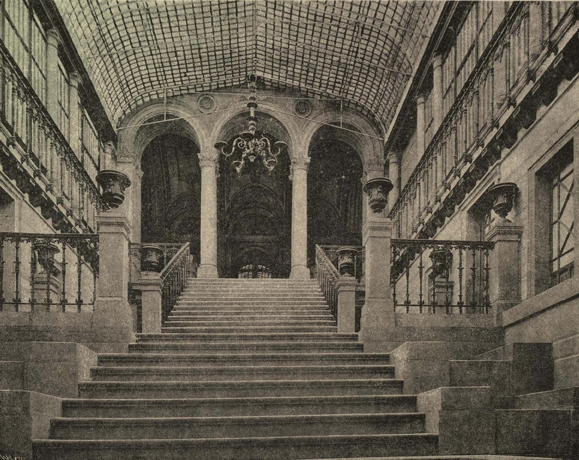 Stuttgart, Villa Berg, Unteres Treppenhaus, um 1860.